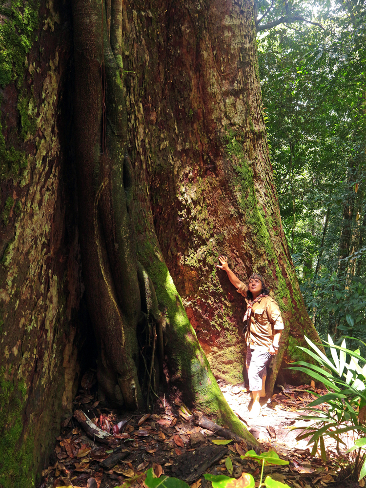 Pohon Meranti berdiameter kira kira lebih dari 10 orang pelukan tangan yang tumbuh di Hutan lindung adat Wehea seluas 38.000 ha di Kalimantan Timur.yang dikelola oleh lembaga adat desa Nehas Liah Bing sejak tahun 2015.